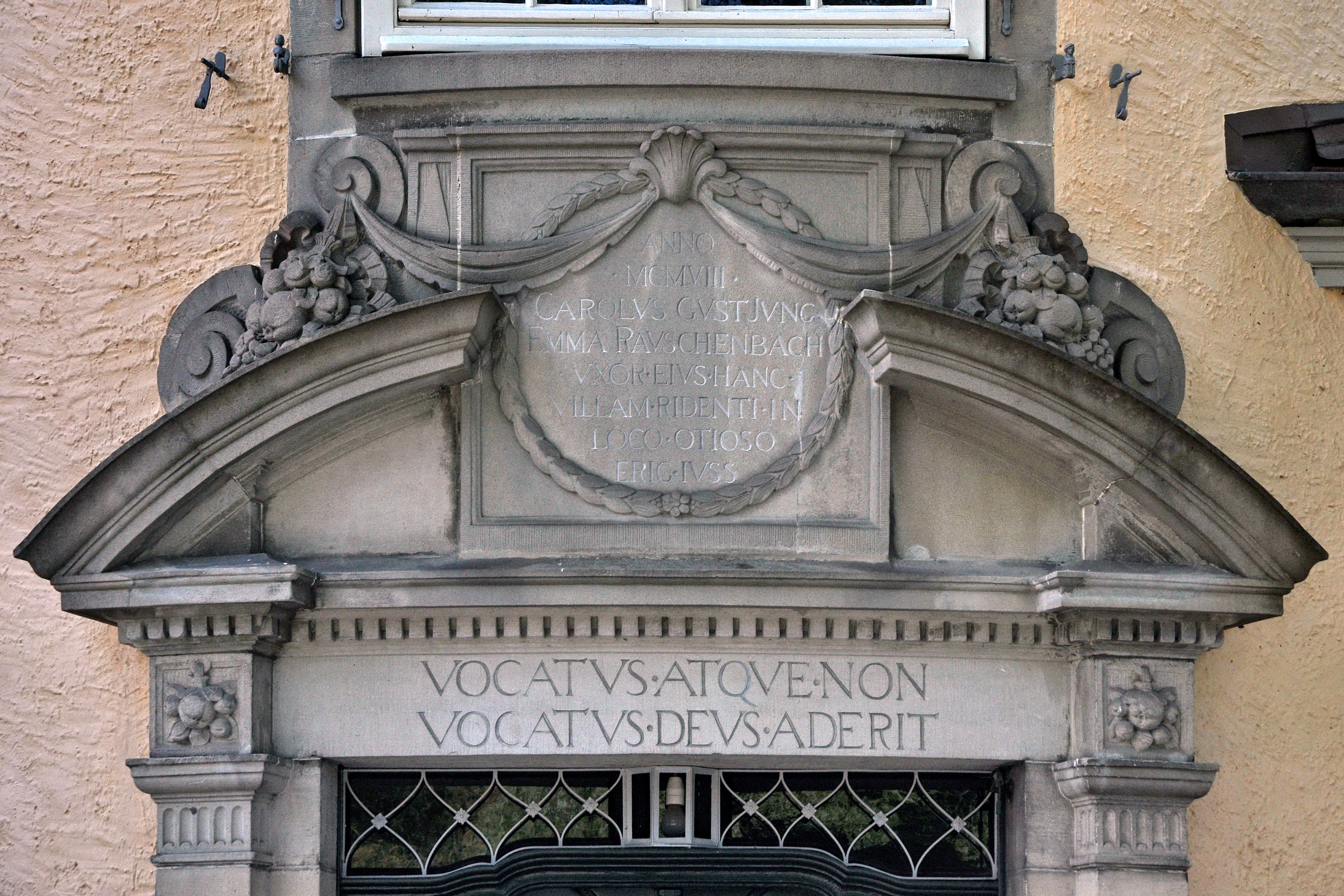 Wohnhaus von C. G. Jung, Seestrasse 228 in Küsnacht (Switzerland)